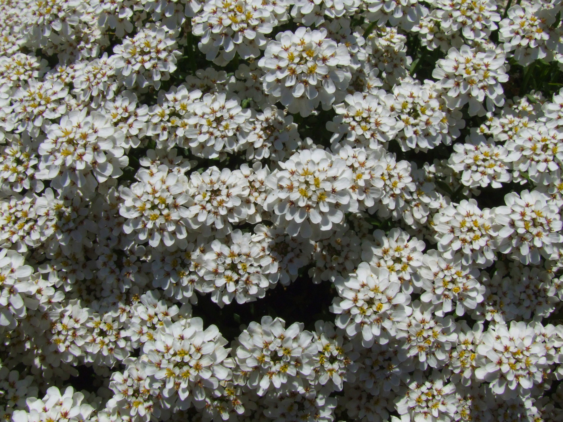 Iberis sempervirens